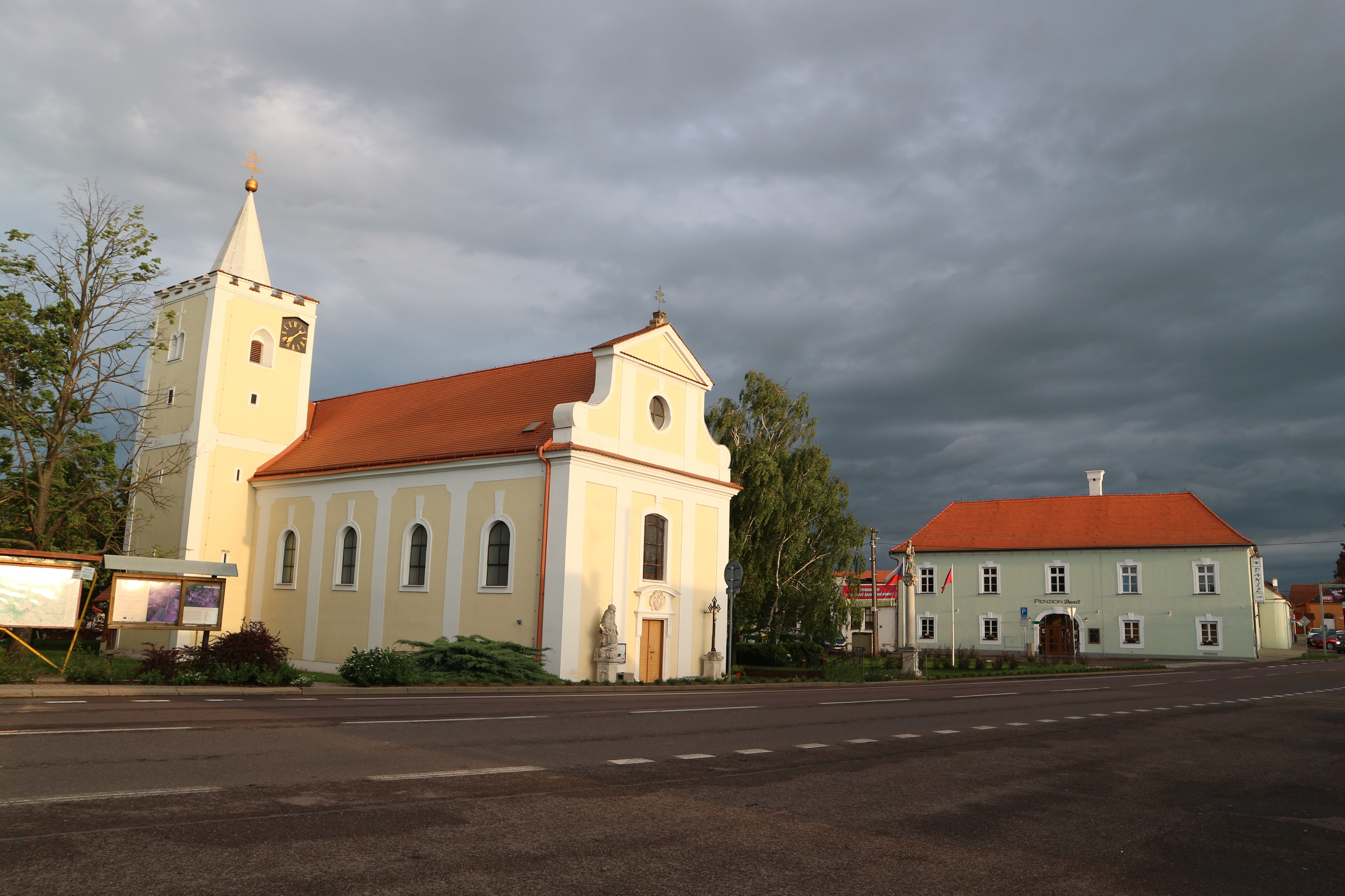 Chvalovice - Kostel sv. Markéty a Penzin Daníž